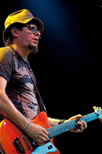 Fred 04 at SESC Pompeia - São Paulo - Brazil